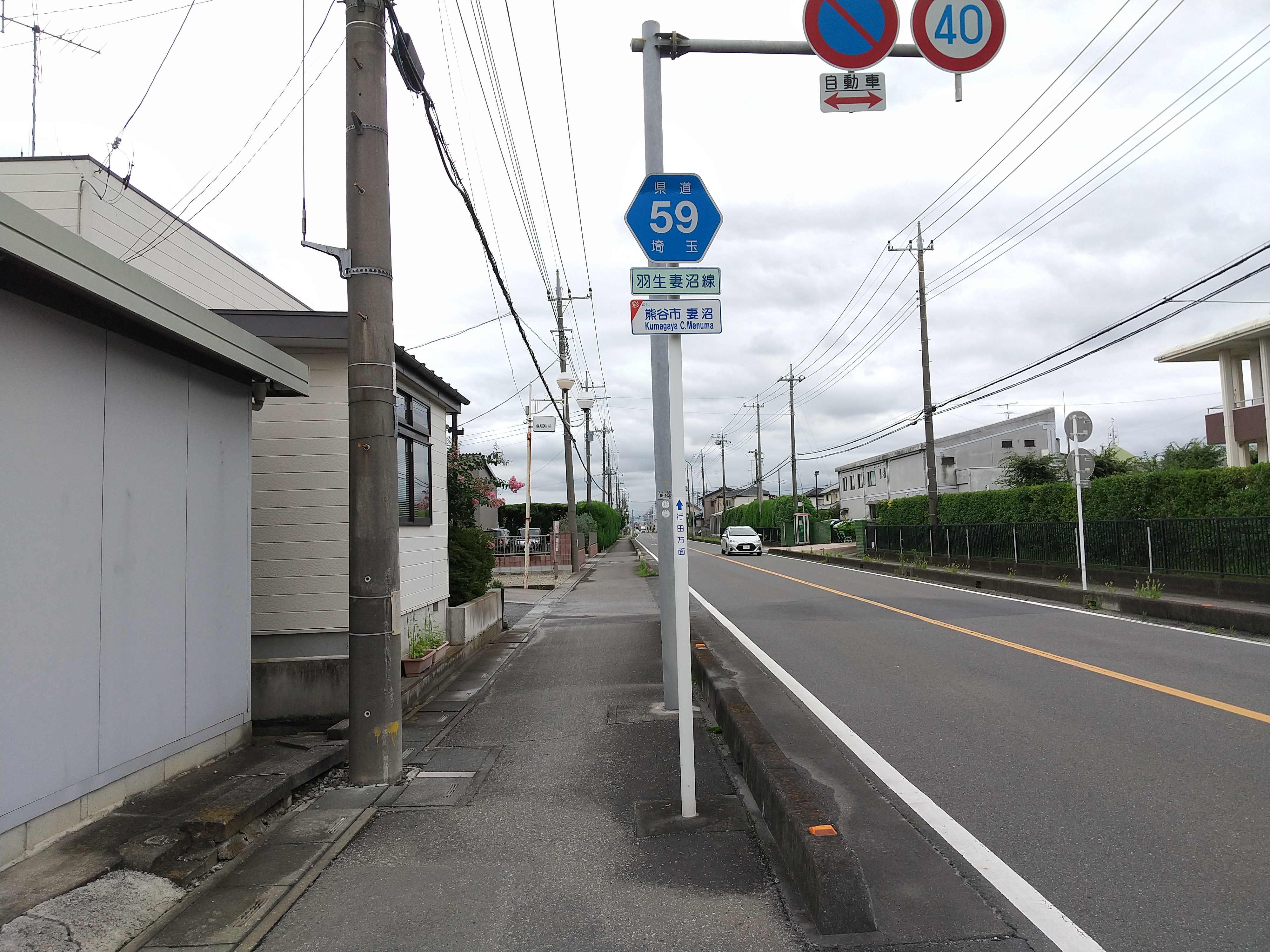 熊谷市妻沼付近にて